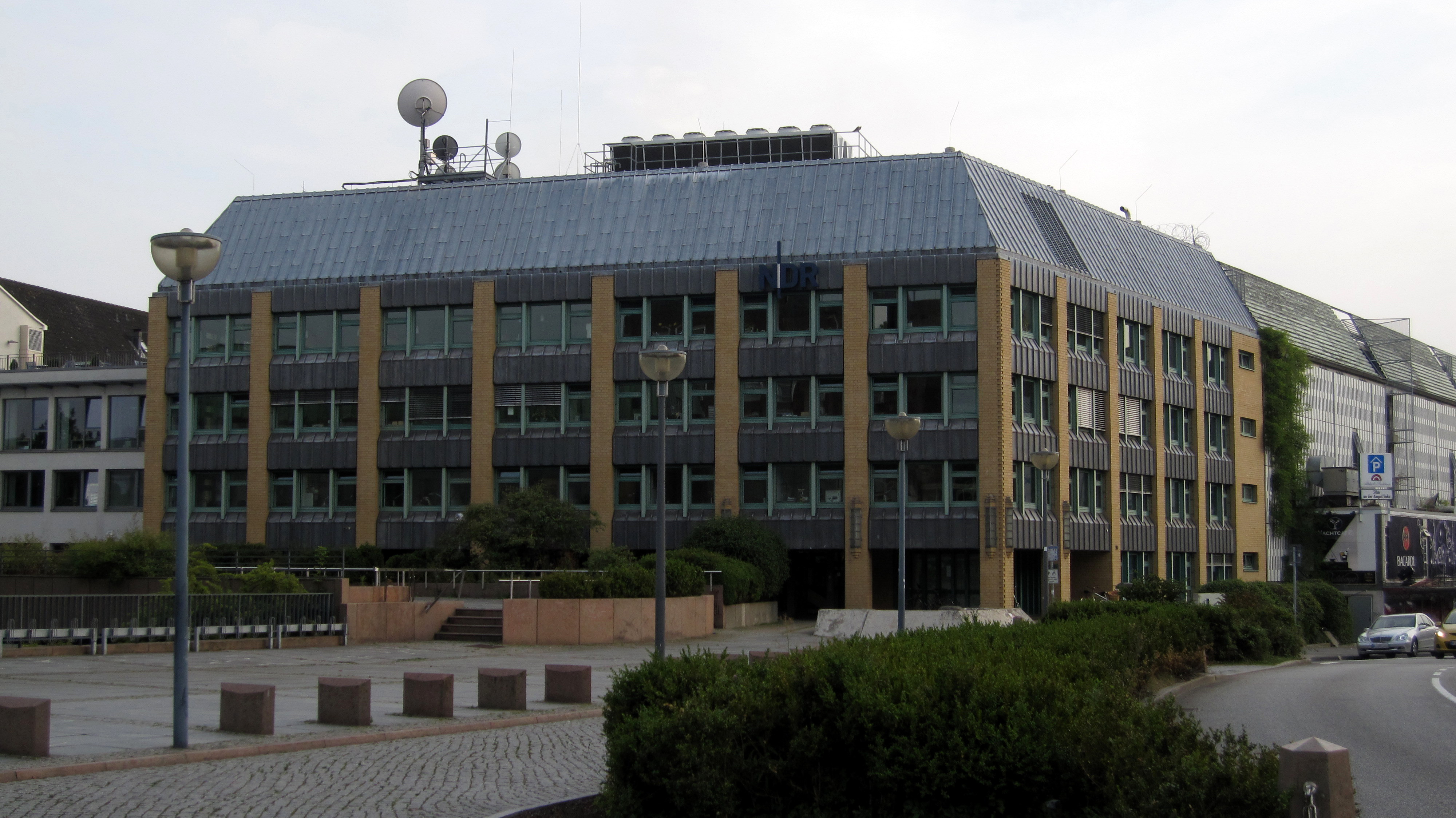 Das NDR Landesfunkhaus Schleswig-Holstein in der Eggerstedtstraße in Kiel, Deutschland.